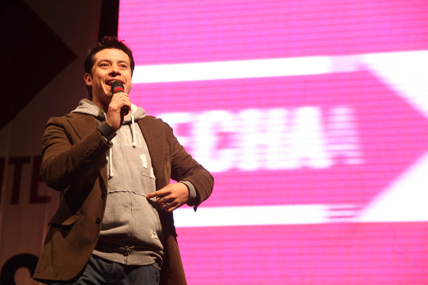 Leandro Martínez en el cierre de campaña de Eduardo Frei realizado en La Serena, 2009.